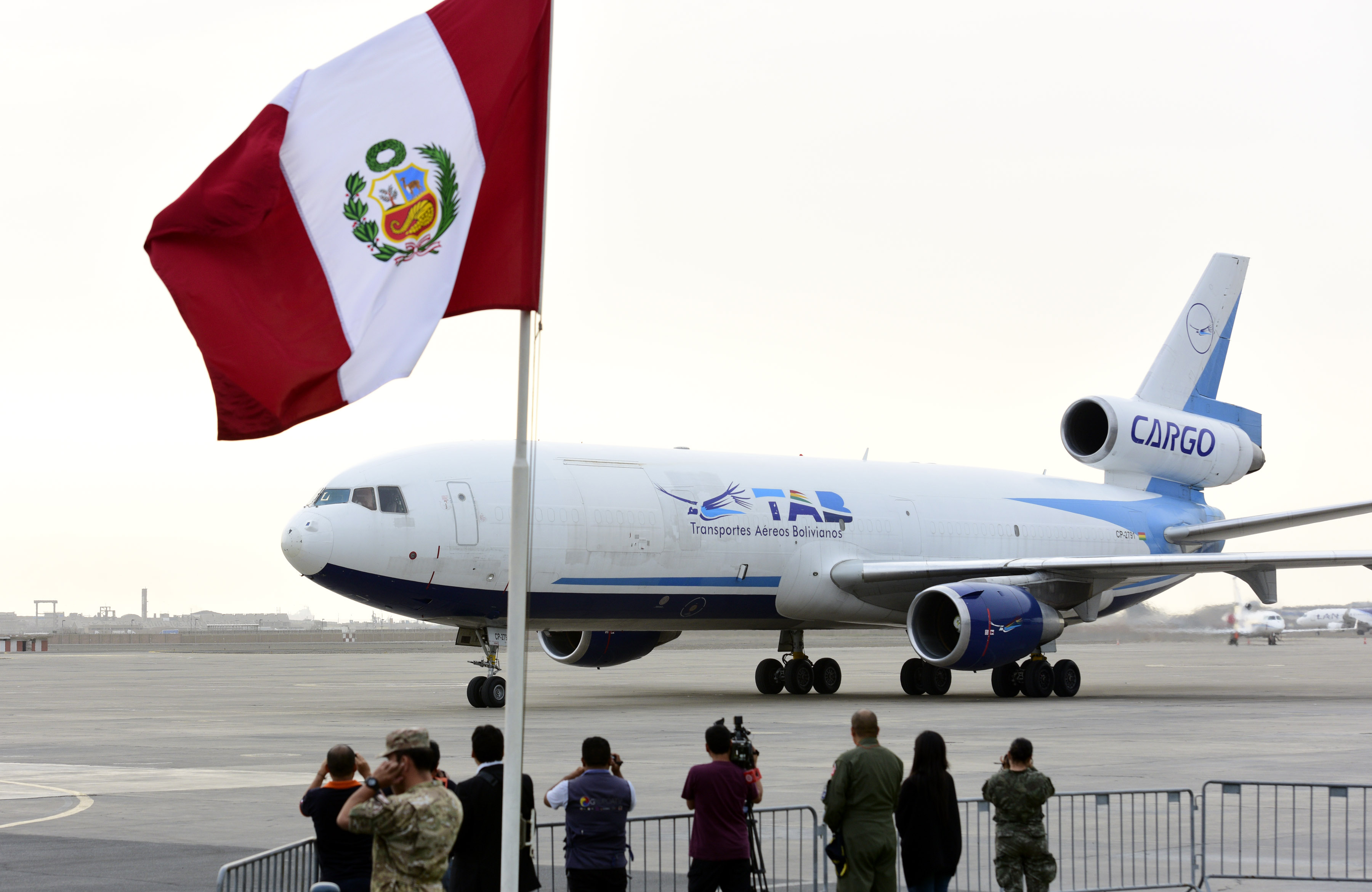 En el Grupo Aéreo N° 8 en el Callao, el Secretario General de la Cancillería, Embajador Eric Anderson, junto al Embajador de Bolivia en el Perú, Gustavo Rodríguez, recibieron al Viceministro de Defensa Civil de Bolivia, Oscar Cabrera, quien arribó en un avión carguero de su país con agua embotellada y tanques de almacenamiento para dicho elemento.